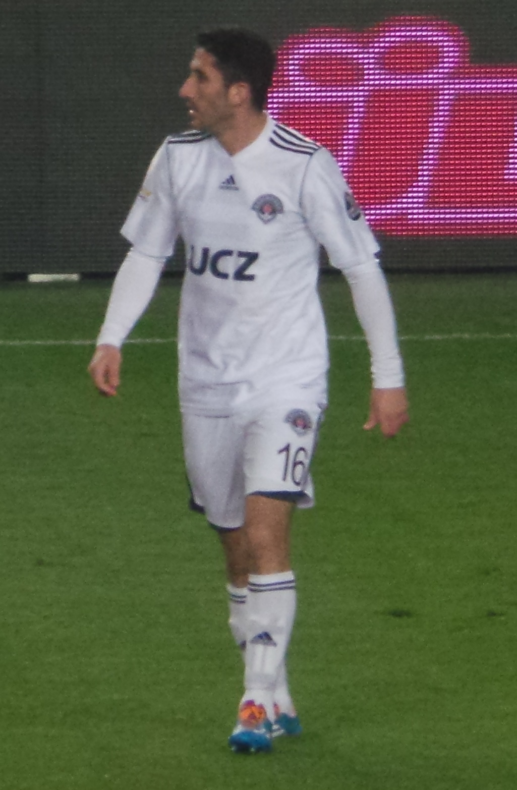 Sanharib Malki kasımpaşa